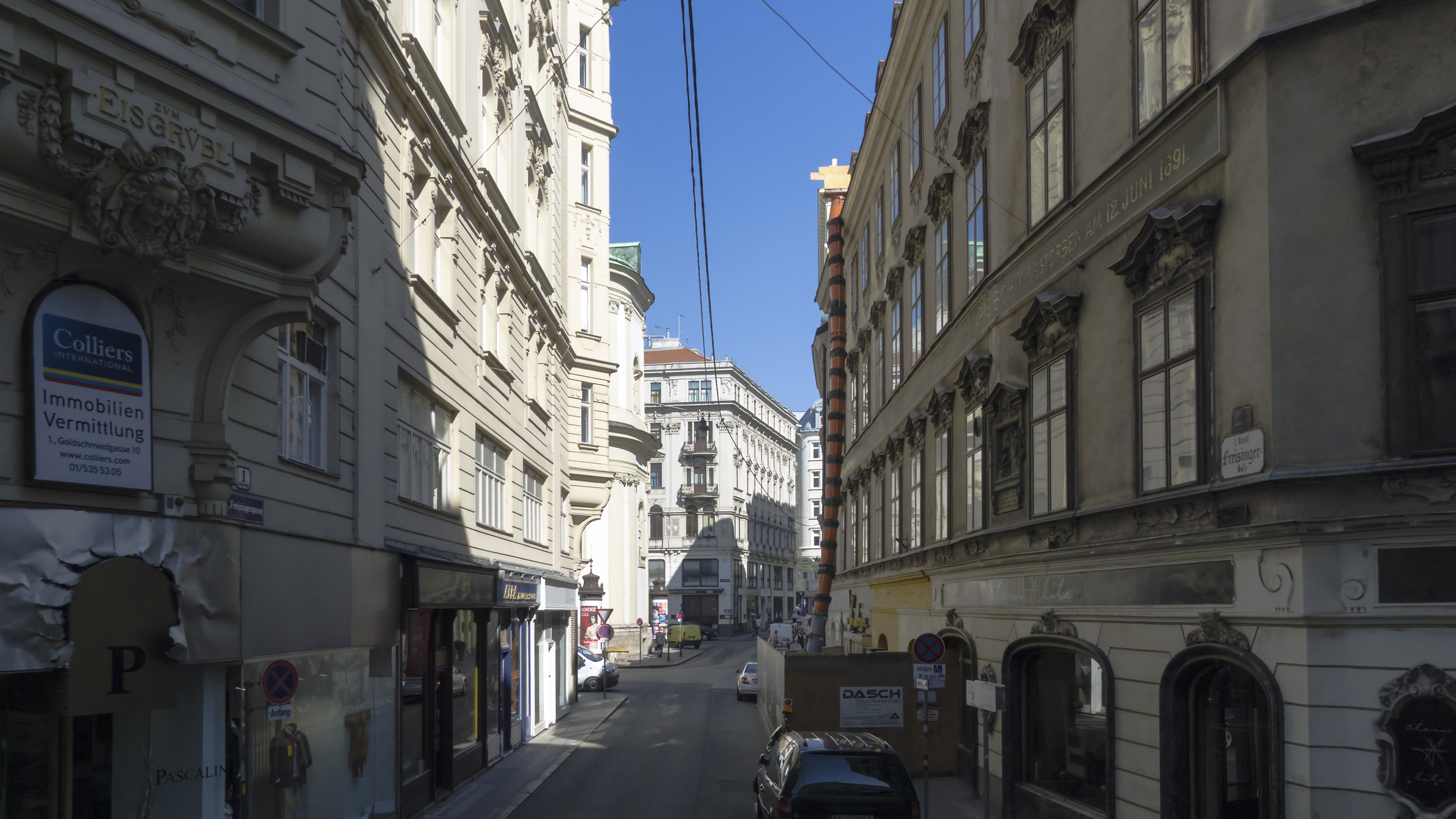 Freisingergasse in Wien 1 bei Nr. 2 Richtung Nordwesten